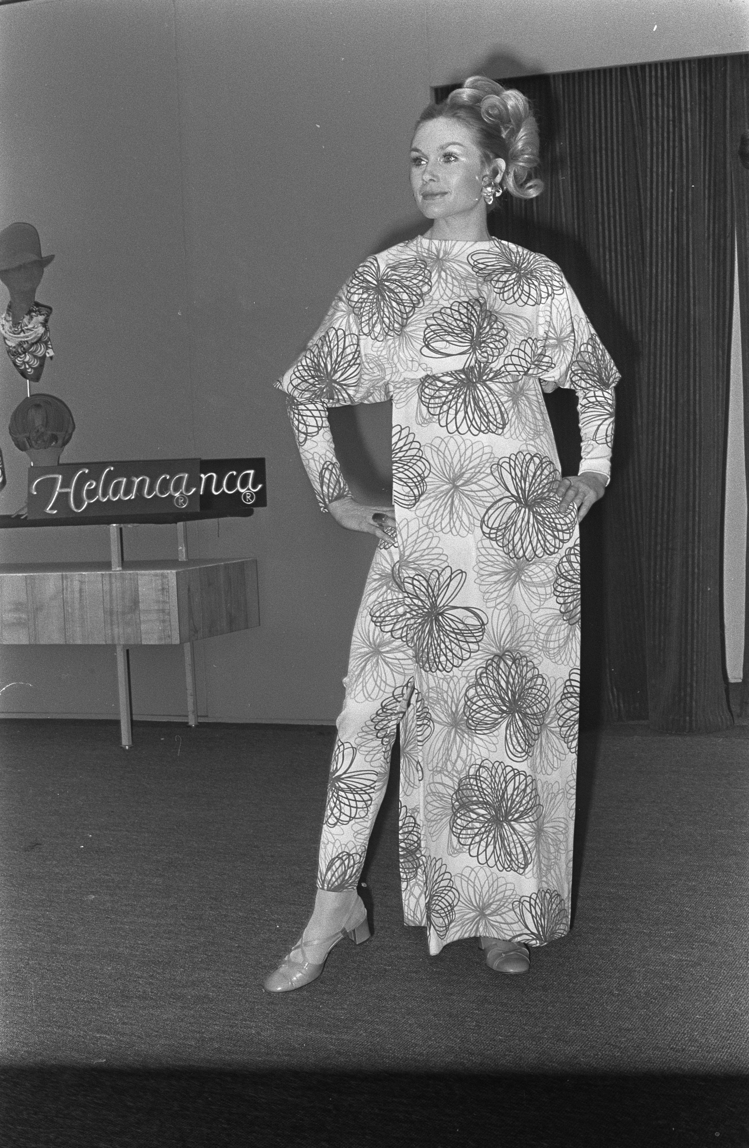 Collectie / Archief : Fotocollectie Anefo Reportage / Serie : [ onbekend ] Beschrijving : 8e Intercontex in de RAI modeshow, avondkleed (van Helanca) Datum : 24 maart 1969 Trefwoorden : modeshows Instellingsnaam : RAI Fotograaf : Nijs, Jac. de / Anefo Auteursrechthebbende : Nationaal Archief Materiaalsoort : Negatief (zwart/wit) Nummer archiefinventaris : bekijk toegang 2.24.01.05 Bestanddeelnummer : 922-2251